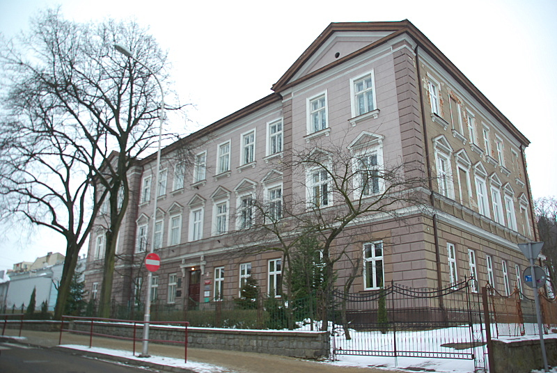 Gimnazjum Królowej Zofii Sanok